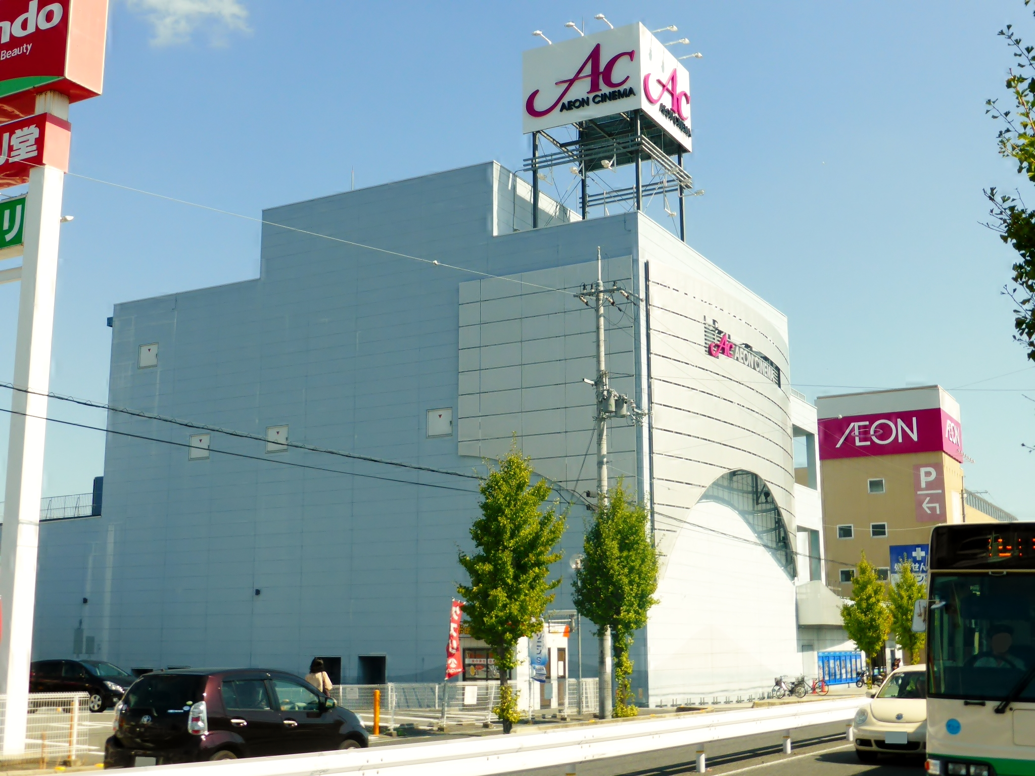 イオンシネマ西大和を撮影。